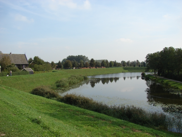 Nieuwpoort_vestingwerken